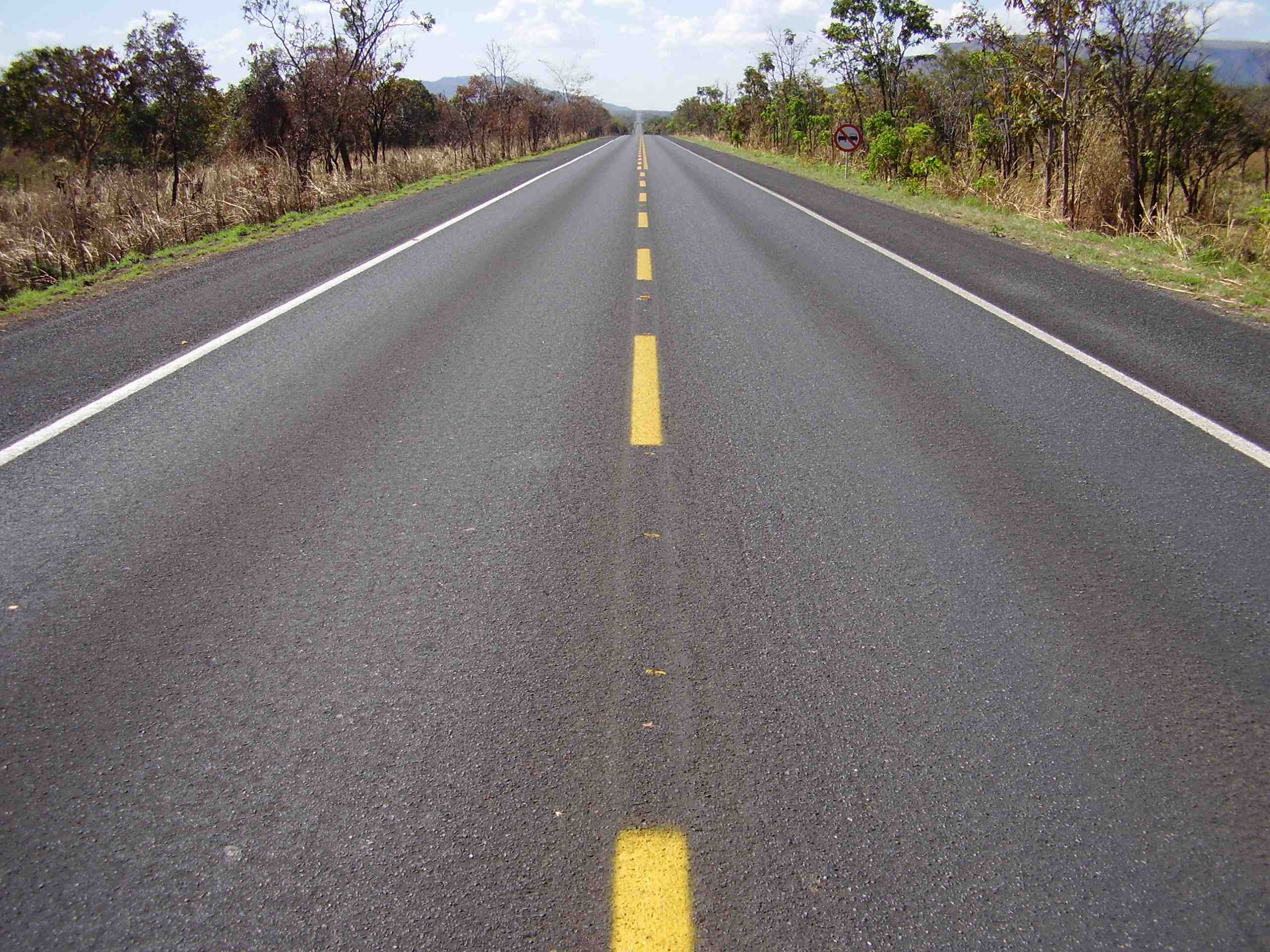 BR-020